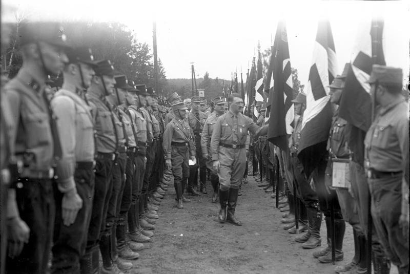 Der grosse Hitlertag in Gera! Der Führer der Nationalsozialisten Adolf Hitler schreitet die Front der Banner ab.